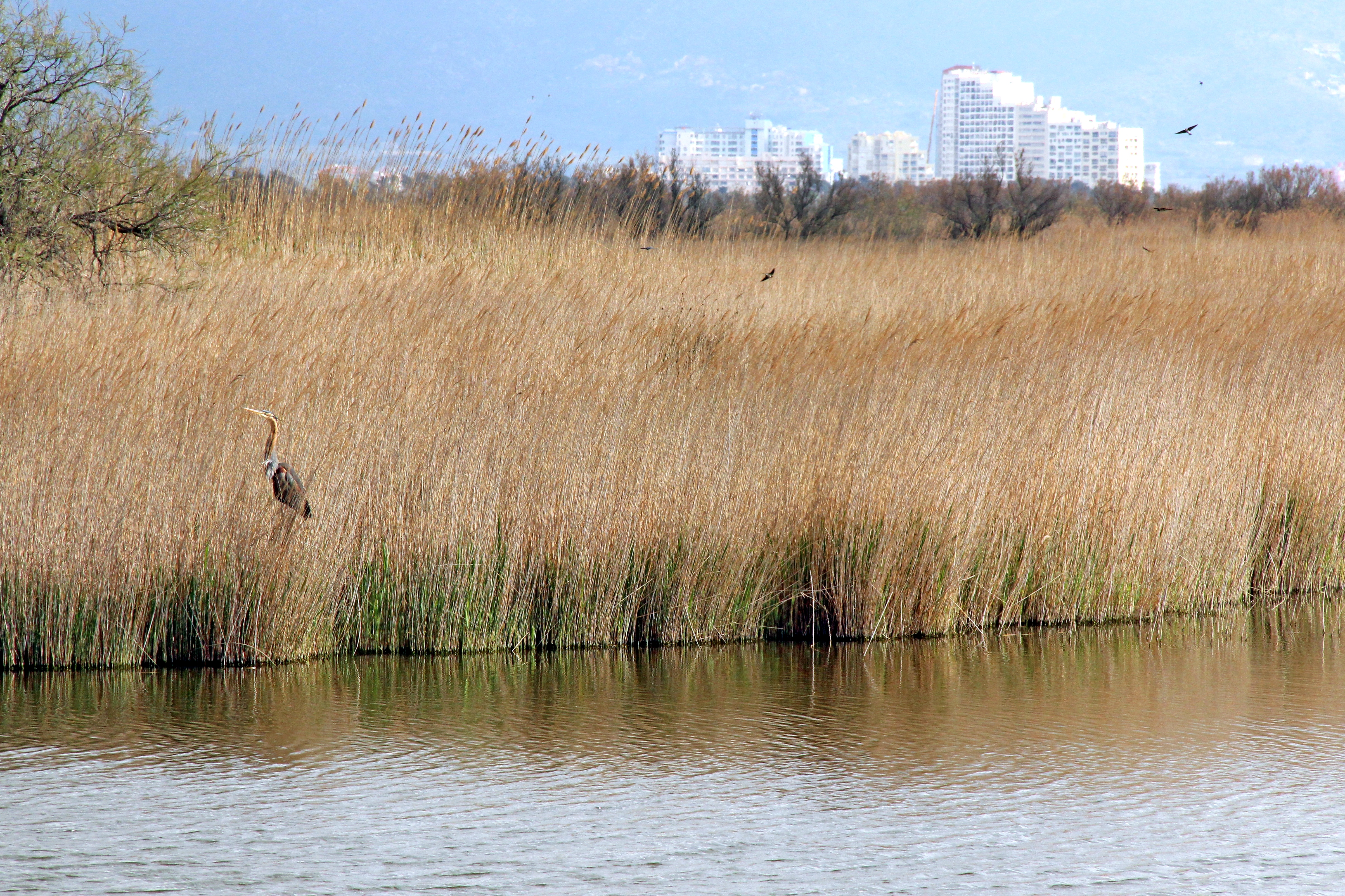 Garza imperial al Parc Natural dels Aiguamolls de l'Empordà This is a photography of a Site of Community Importance in Spain with the ID: ES0000019. Natura2000 entry, EEA entry